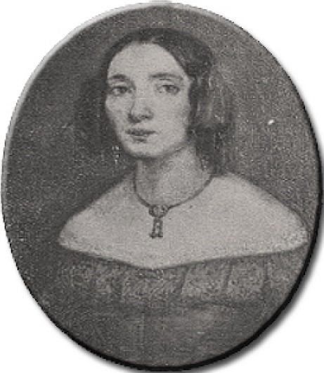 Amelia Sarteschi Calani Carletti (1802-1856)